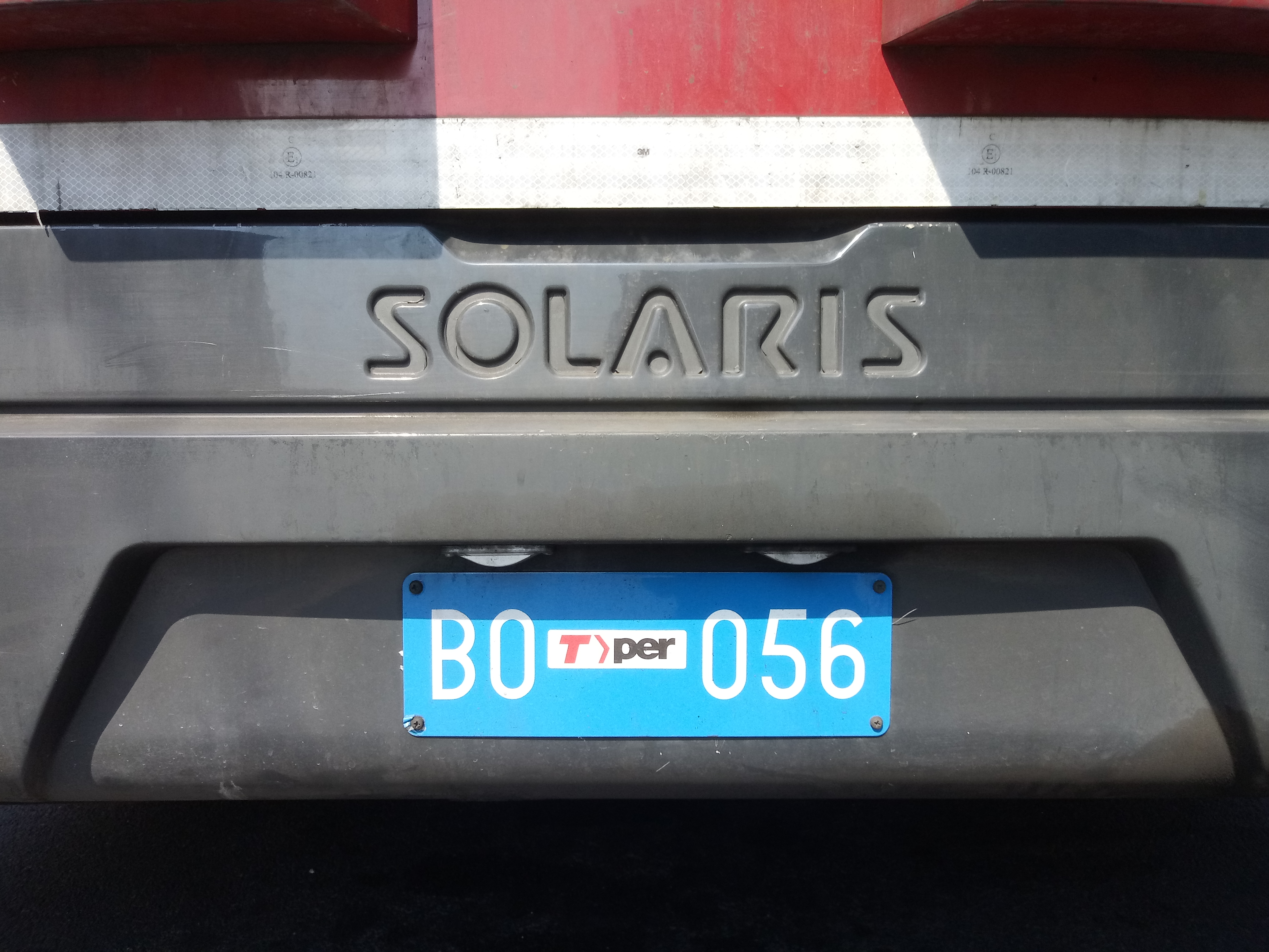 La foto rappresenta la targa posteriore di un filosnodato Solaris Trollino 18 in servizio a Bologna